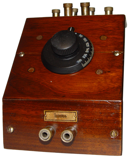 Telefongyár egyik első detektoros készüléke